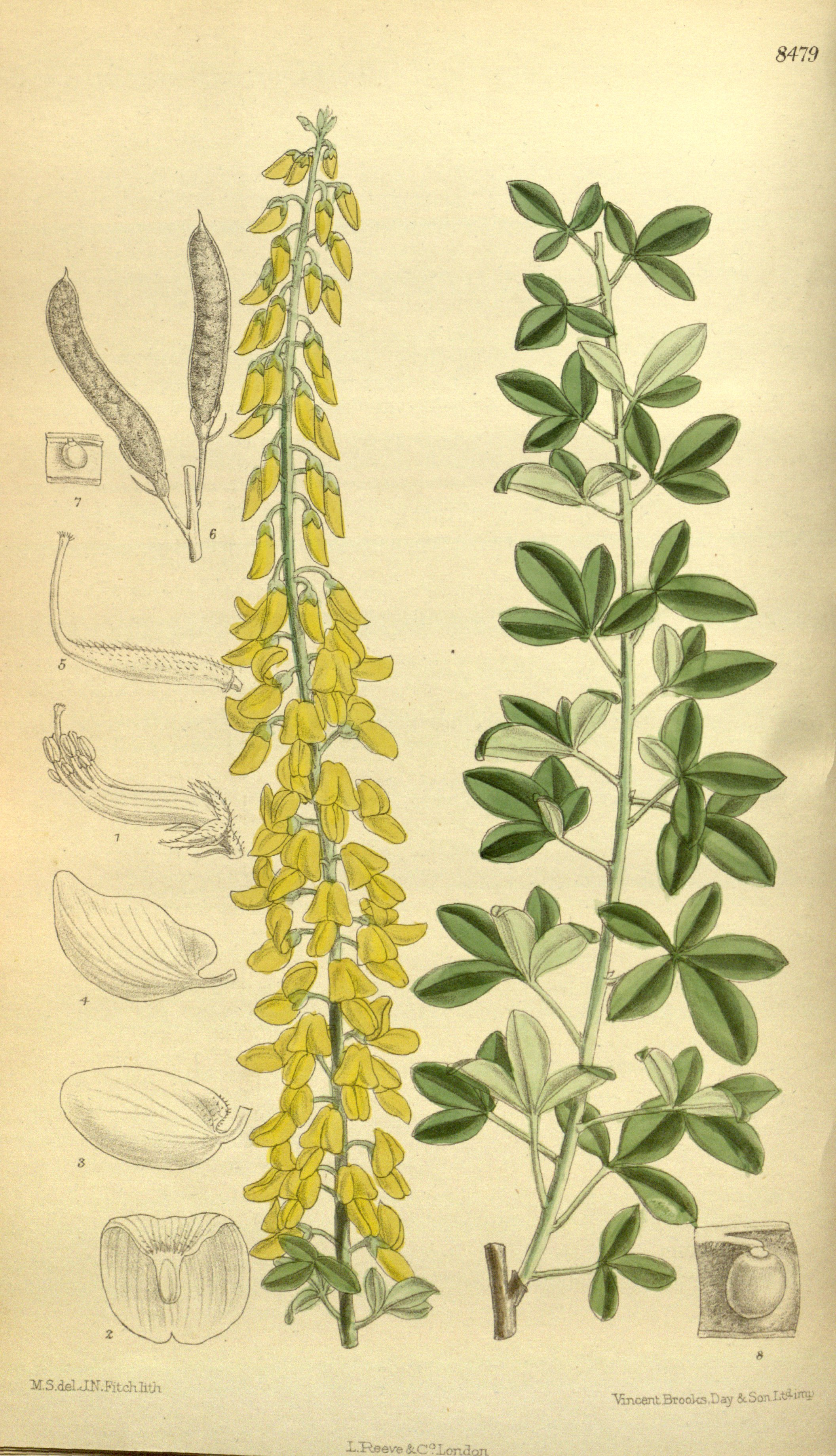 Cytisus nigricans (= Lembotropis nigricans), Fabaceae, Faboideae